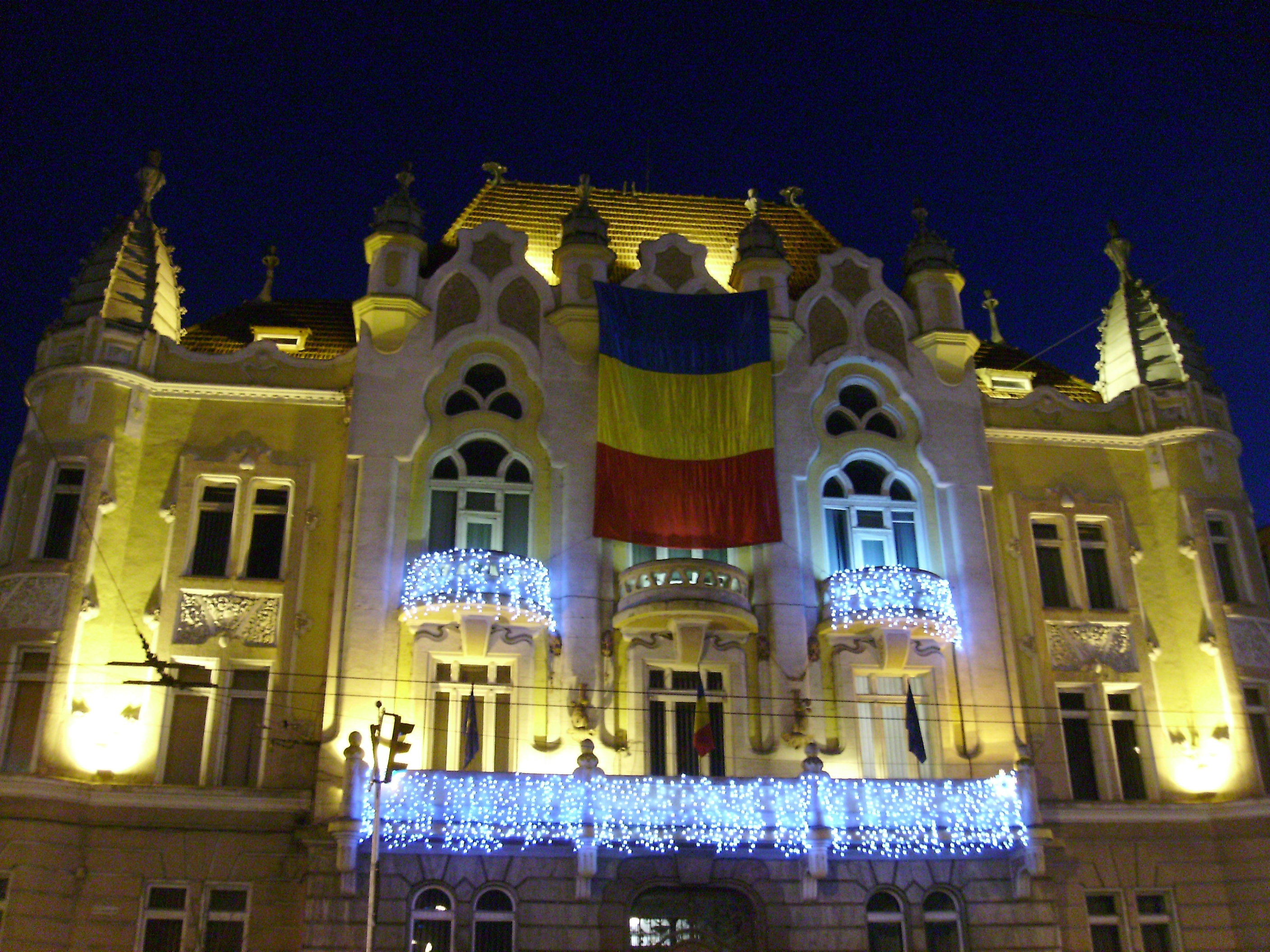 Cluj-Napoca, Prefectura, Bulev. 21 Decembrie 1989 nr.58